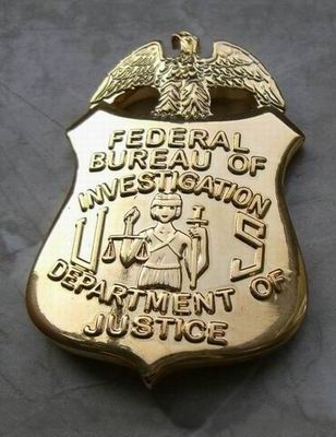 Dienstmarke des FBI